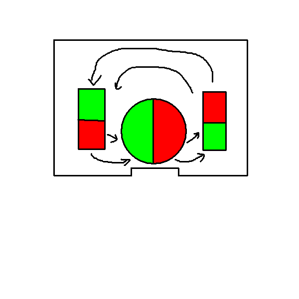 Skizze des Magnetfeldes eine Lasthebemagnets im ausgeschalteten Zustand. Am Polschuh links ist der rote Nordpole des festen linken Magnetes und der Südpol des drehbaren mittleren Magnetes angeordnet.Die Magneten schwächen sich gegenseitig ab. Außen ist nur ein geringes Magnetfeld. Am Polschuh rechts st der grüne Südpole des festen rechten Magnetens und der Nordpol des drehbaren mittleren Magnetes angeordnet. Die Magneten schwächen sich gegenseitig ab. Außen ist nur ein geringes Magnetfeld.